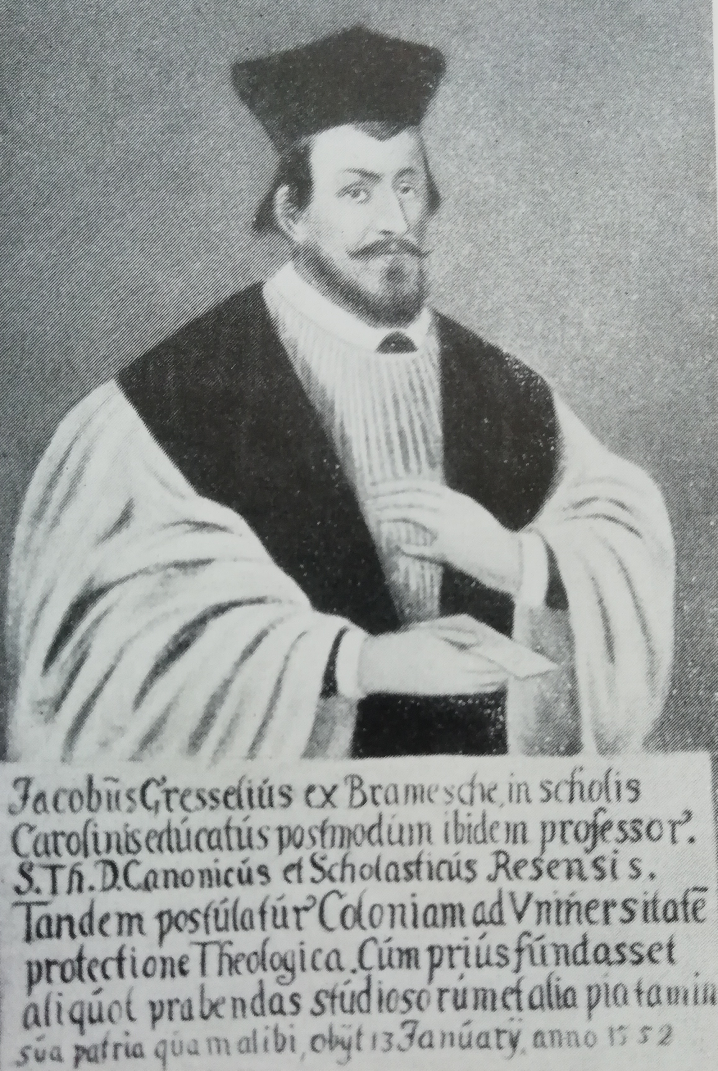 Wohl authentisches Porträtgemälde aus dem 16. Jh.